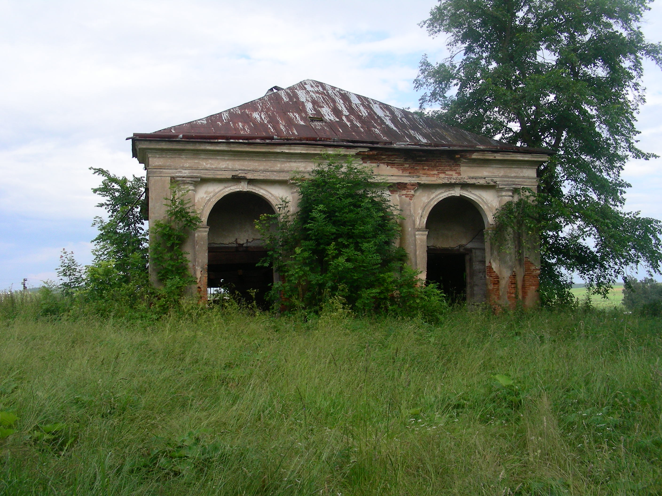 Беларуская (тарашкевіца): Сядзіба (уязная брама, стайні, сьвіран). в. Вялікая Ліпа This is a photo of Belarusian heritage monument. Reference number: 613Г000486 ( WLM)